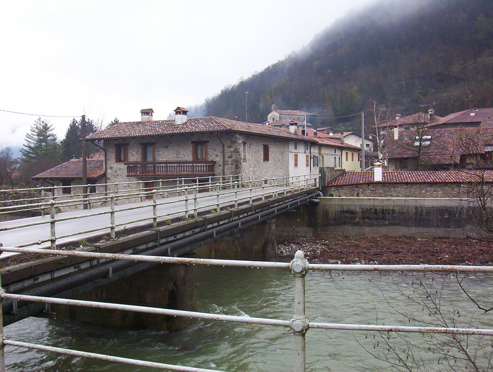 Il ponte sul fiume Cosizza tra Merso di Sopra e Scrutto. Il centro abitato sullo sfondo è Scrutto, una frazione del comune di San Leonardo (UD), Italia. L'immagine è una fotografia scattata da Trevirgola e risale all'autunno 2005.